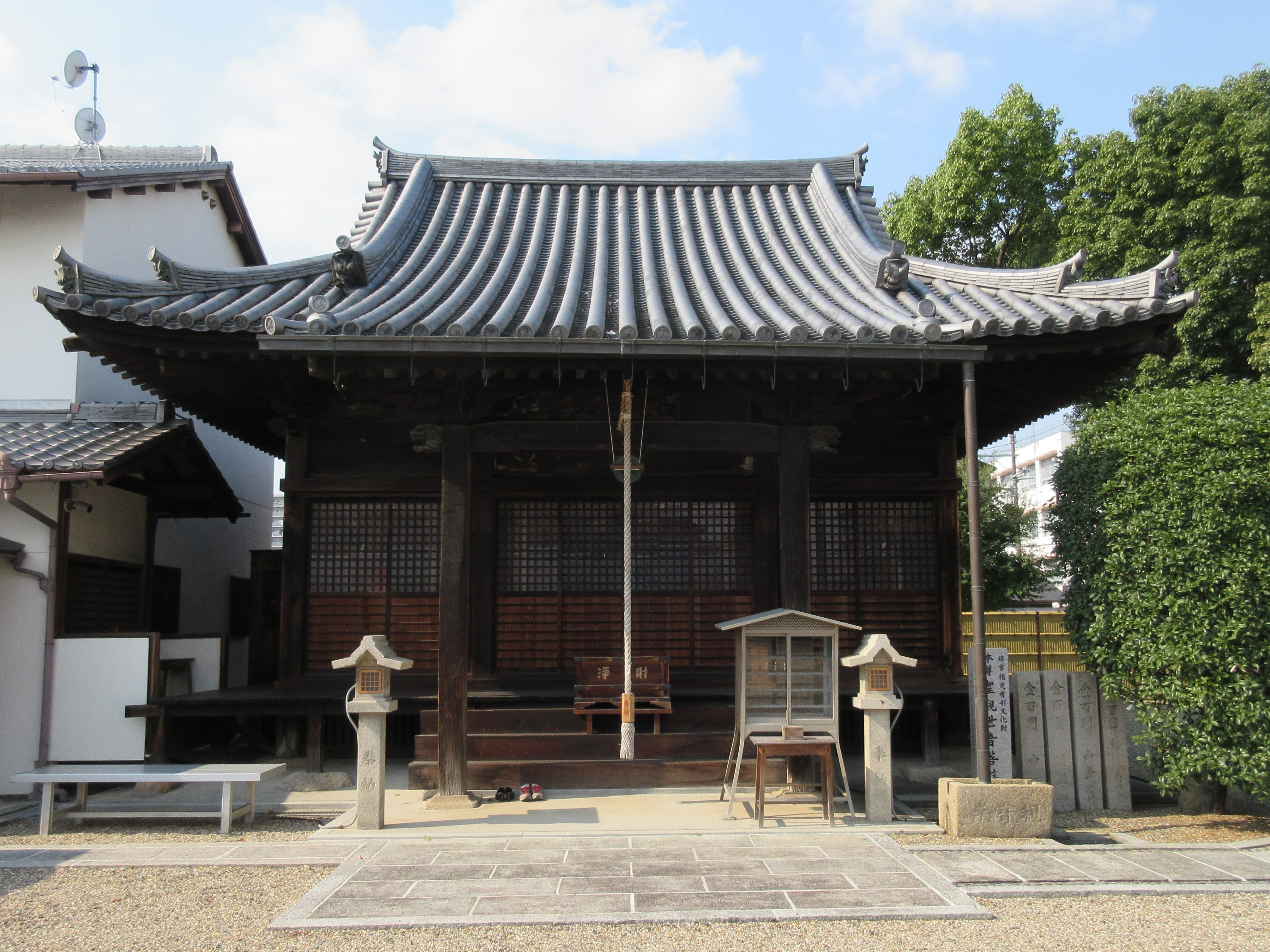 堺市の愛染院